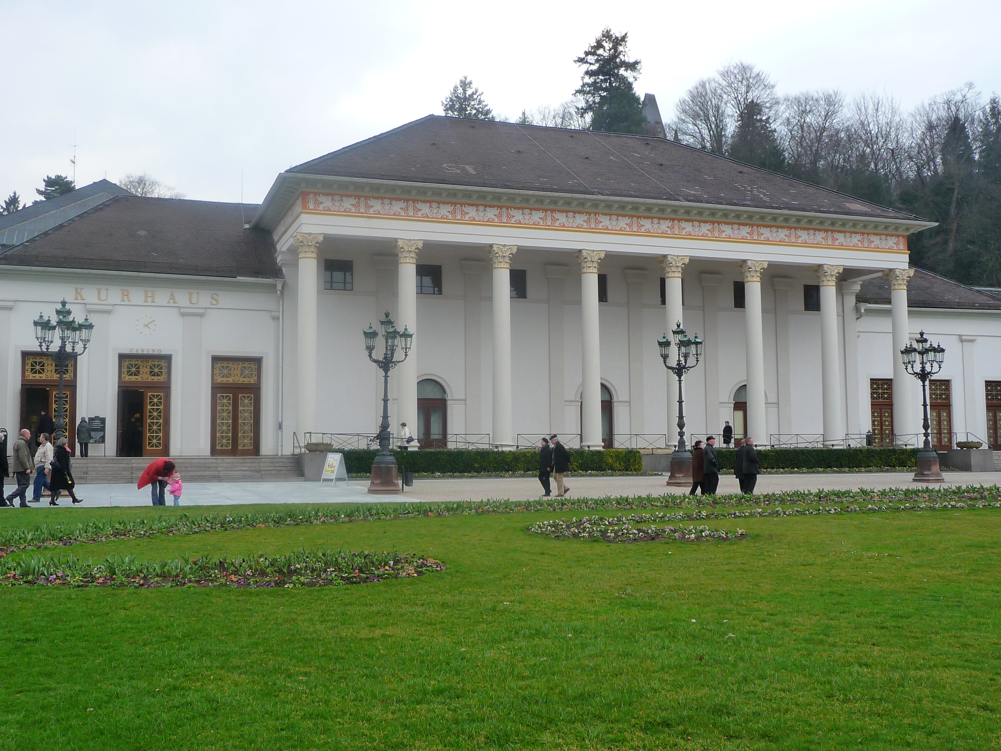 Kurhaus in Baden-Baden (Haupteingang und Mittelbau)